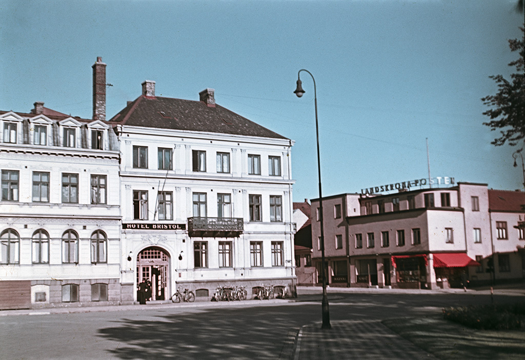 Hotel Bristol at Trädgårdsgatan (Garden street). Hotell Bristol vid trädgårdsgatan. Parish (socken): Landskrona Province (landskap): Skåne Municipality (kommun): Landskrona County (län): Skåne Photograph by: Fredrik Bruno Date: 1943 Format: Colour slide See a recent photo of the same view: Persistent URL: Read more about the photo database (in english)